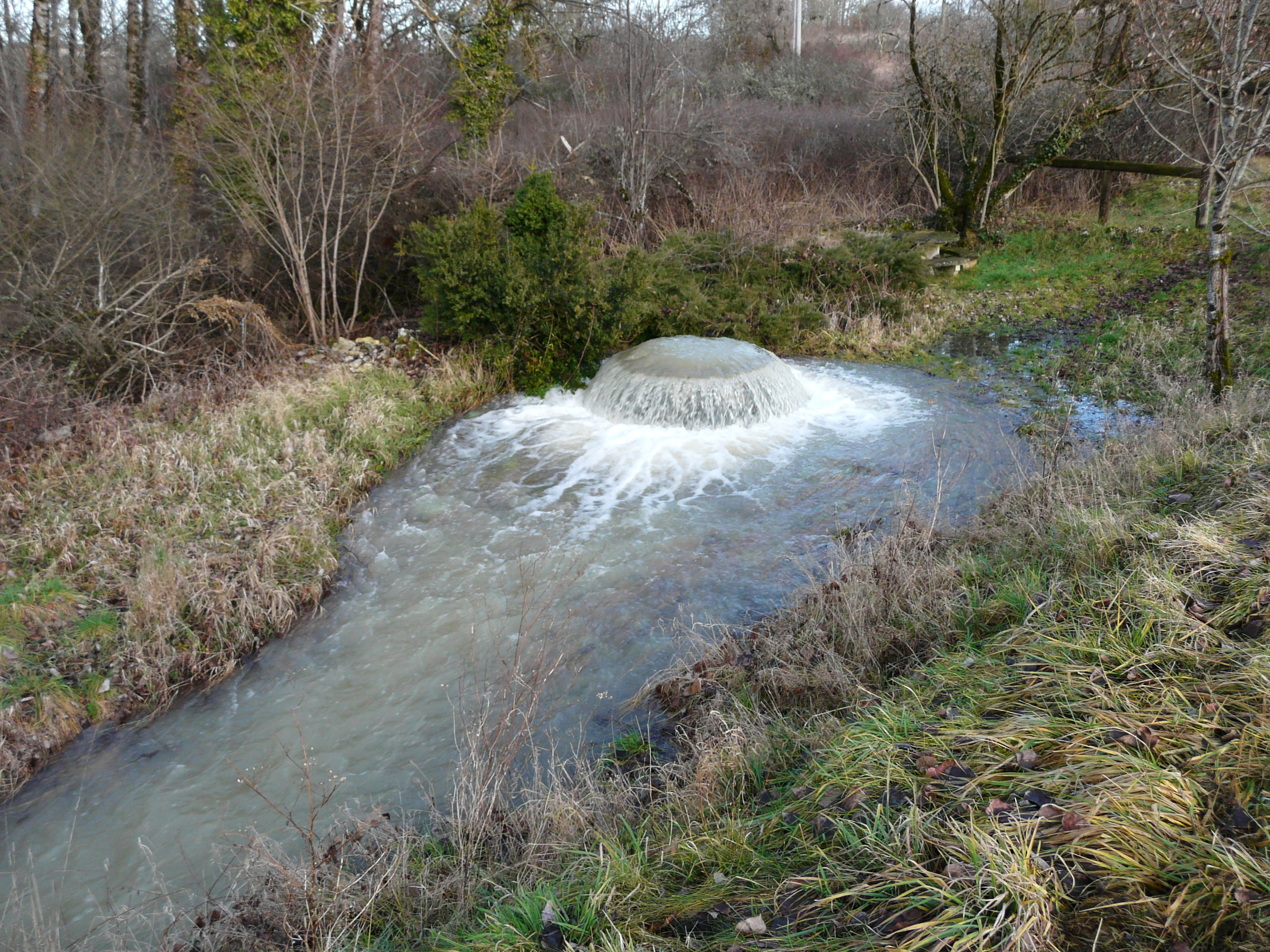 Source artésienne du Blâme (après une période de plusieurs jours de fortes pluies), puits de Bontemps, Brouchaud, Dordogne, France